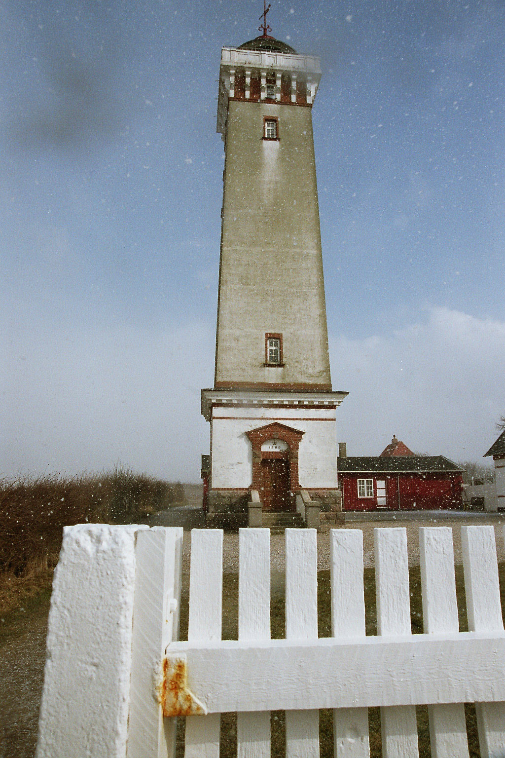 Helnæs fyr